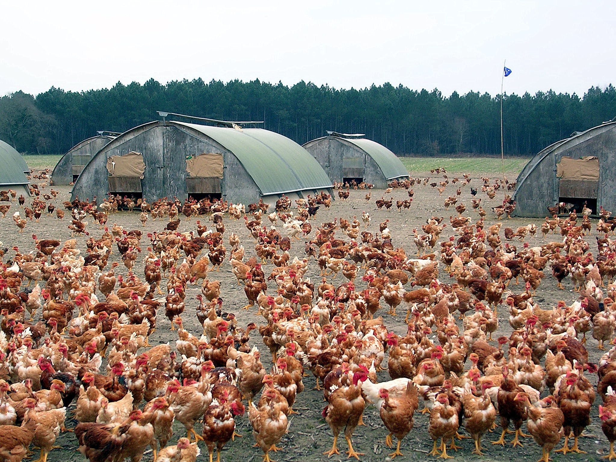 Elevage de volailles des Landes, à Benquet